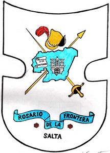 Escudo de la municipalidad de Rosario de la Frontera.